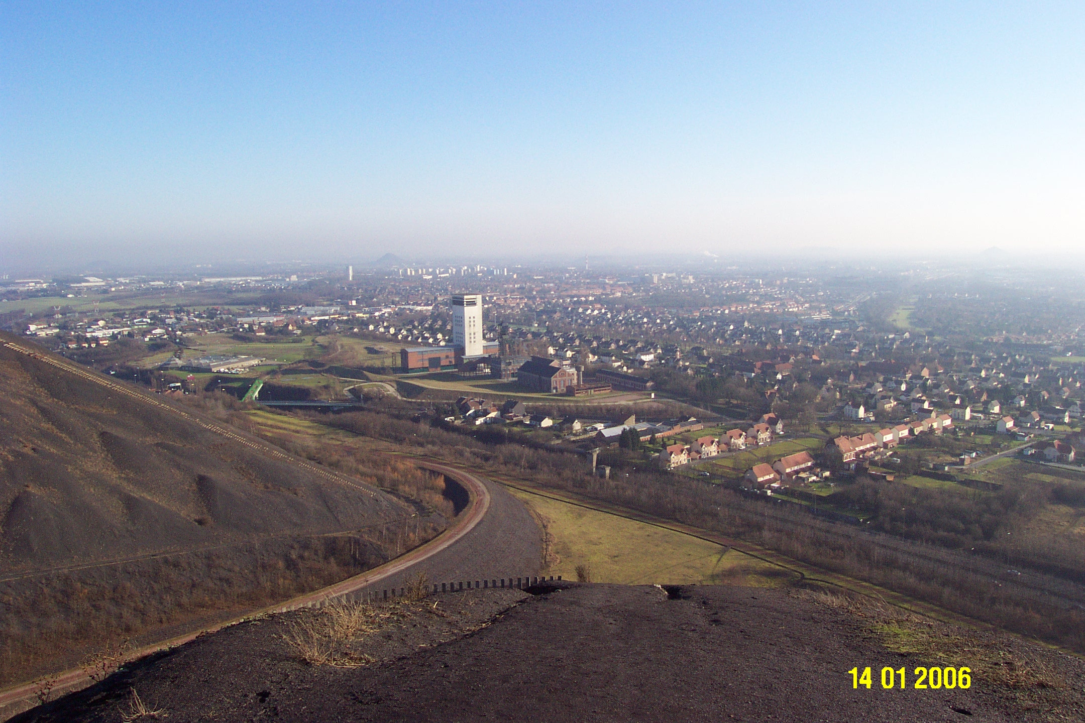 Terrils n° 74, 74A et 74B respectivement dénommés 11 - 19 de Lens Est, 11 - 19 de Lens Ouest et 11 - 19 de Lens Nouveau, fosse n° 11 - 19 de la Compagnie des mines de Lens, Loos-en-Gohelle, Pas-de-Calais, Nord-Pas-de-Calais, France.